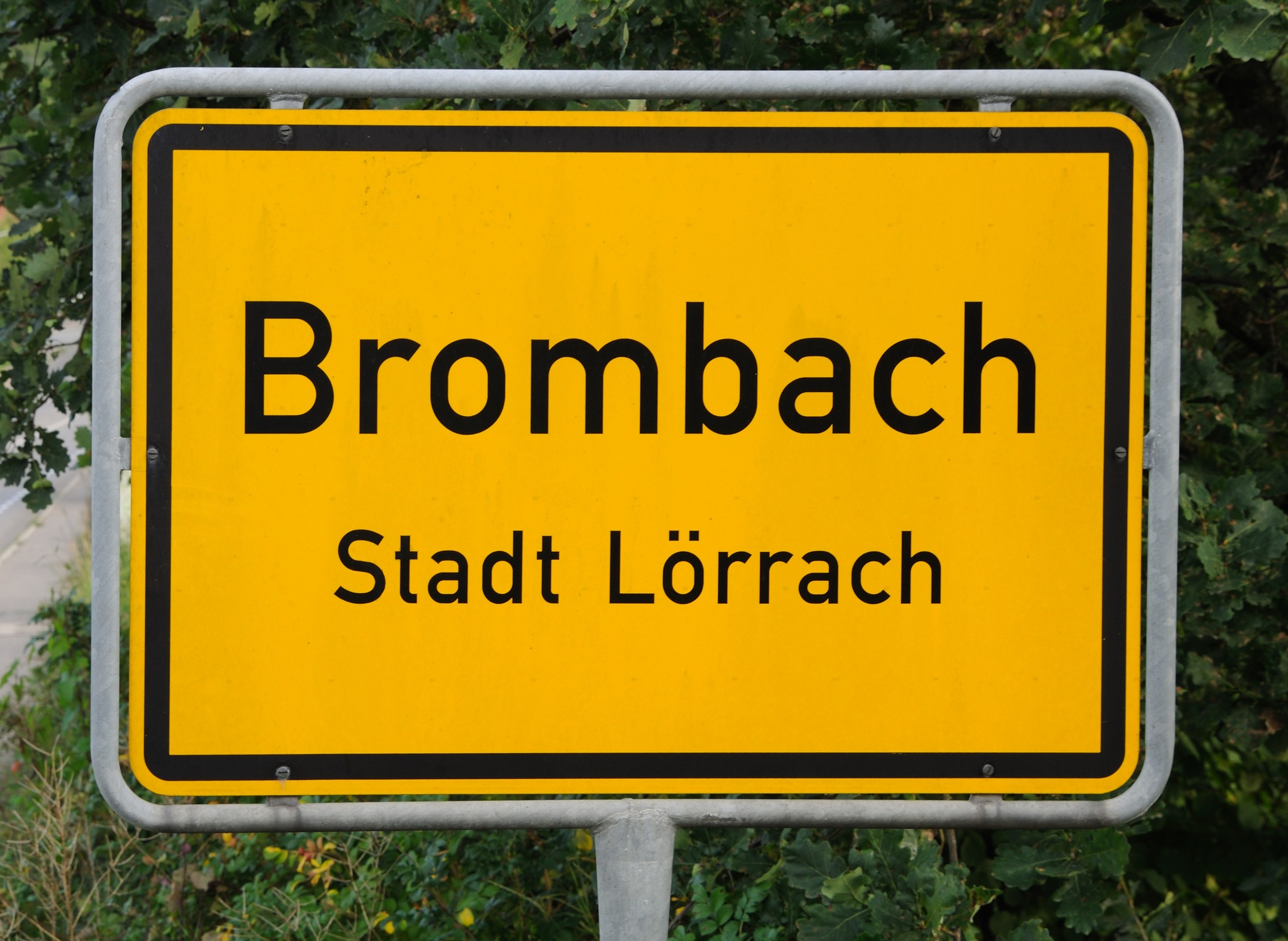 Ortstafel Brombach, Stadt Lörrach